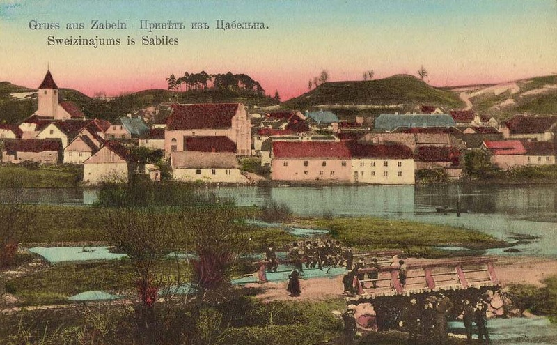 Vaade Sabile ordulinnuse asukohale edelast XX sajandi algul.